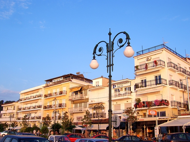 Limenas, Thasos / Tasos / Θάσος / Тасос